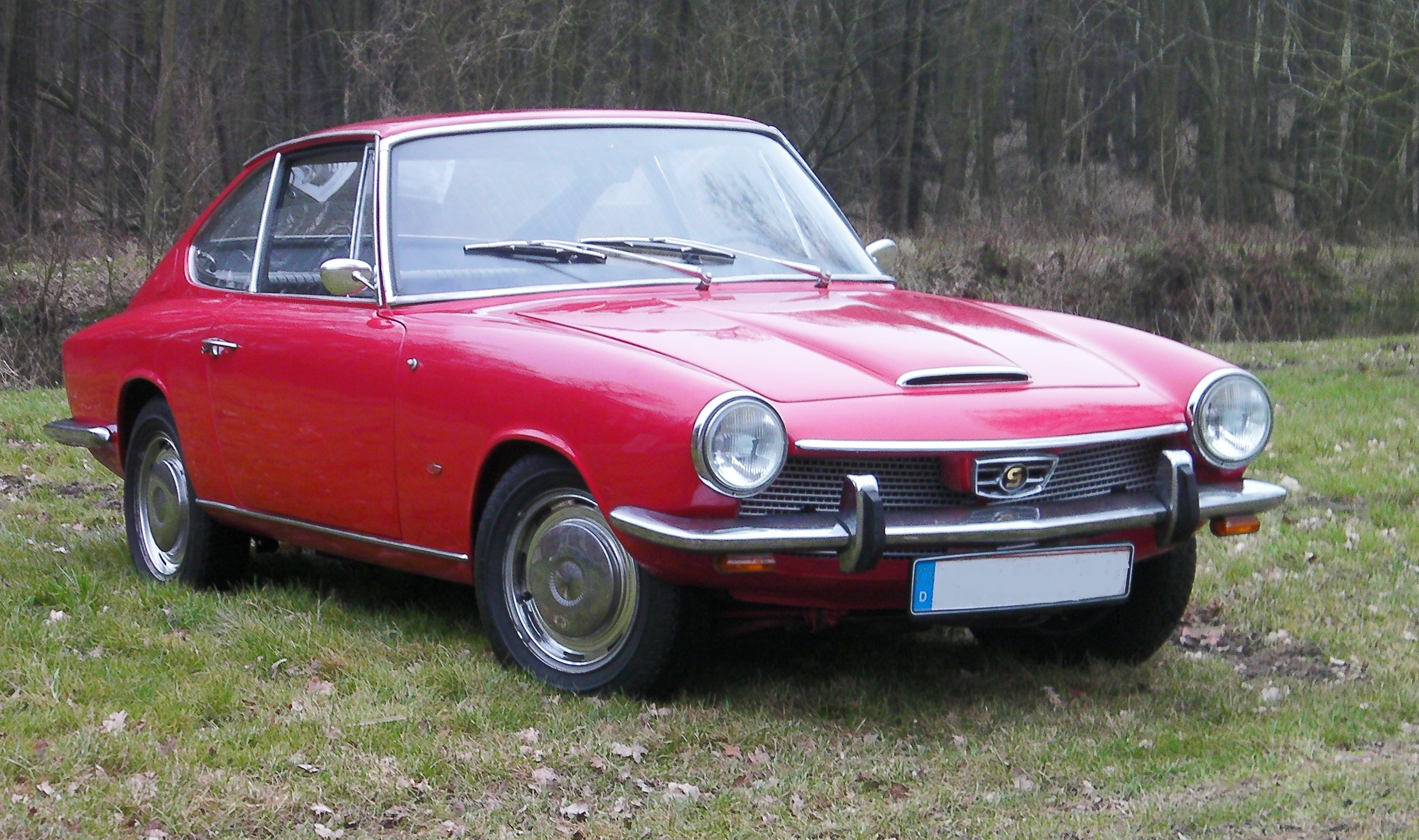 Glas 1700GT